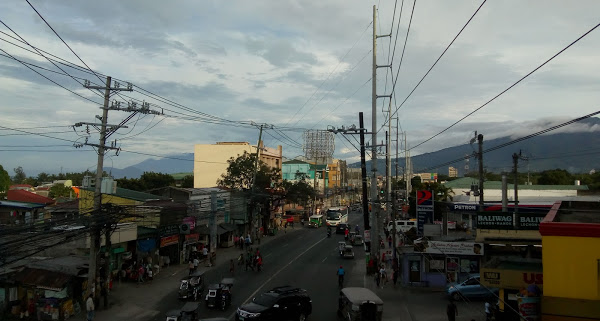 Tanawin mula sa overpass ng Lianas sa Parian